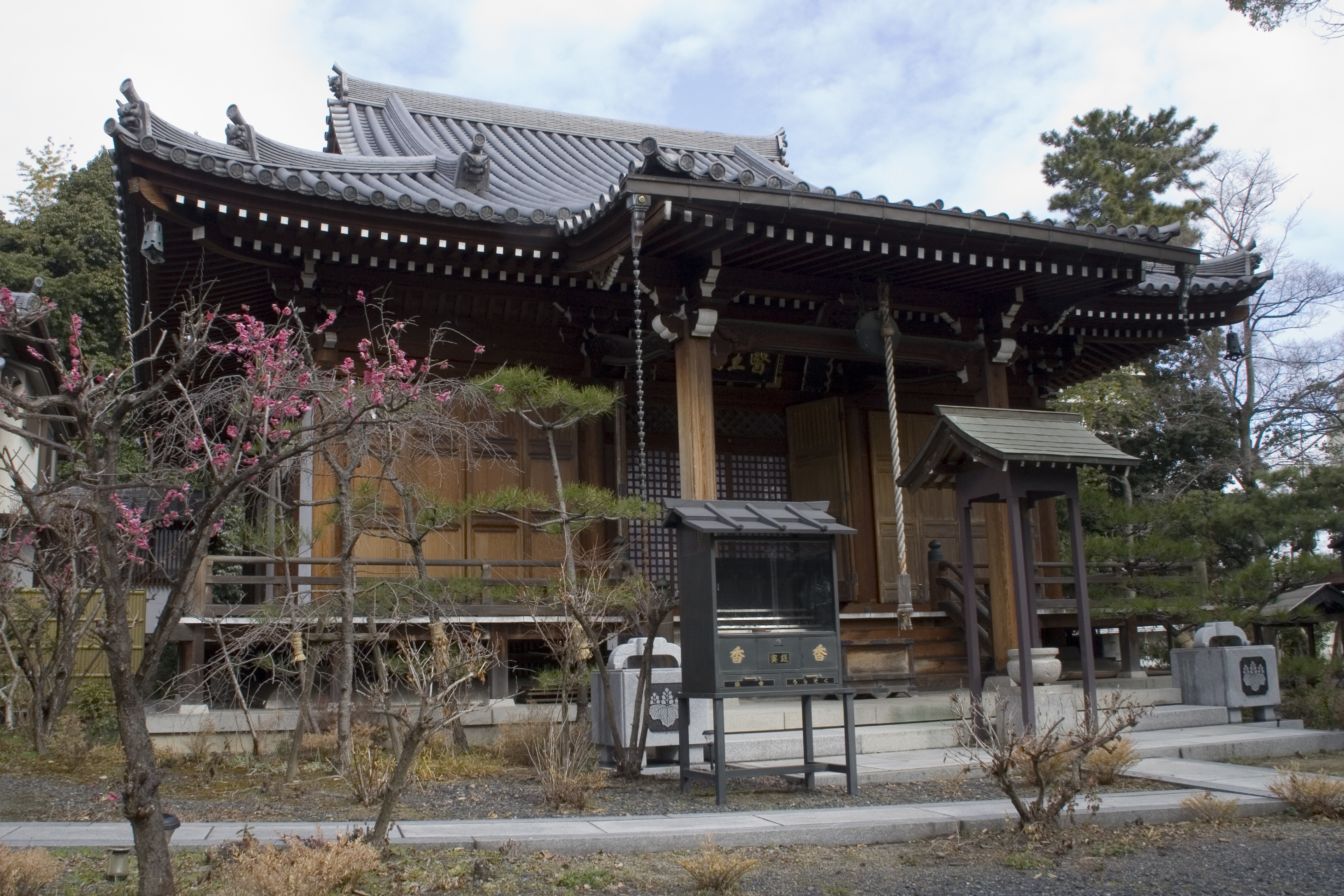 蓮華寺 本堂